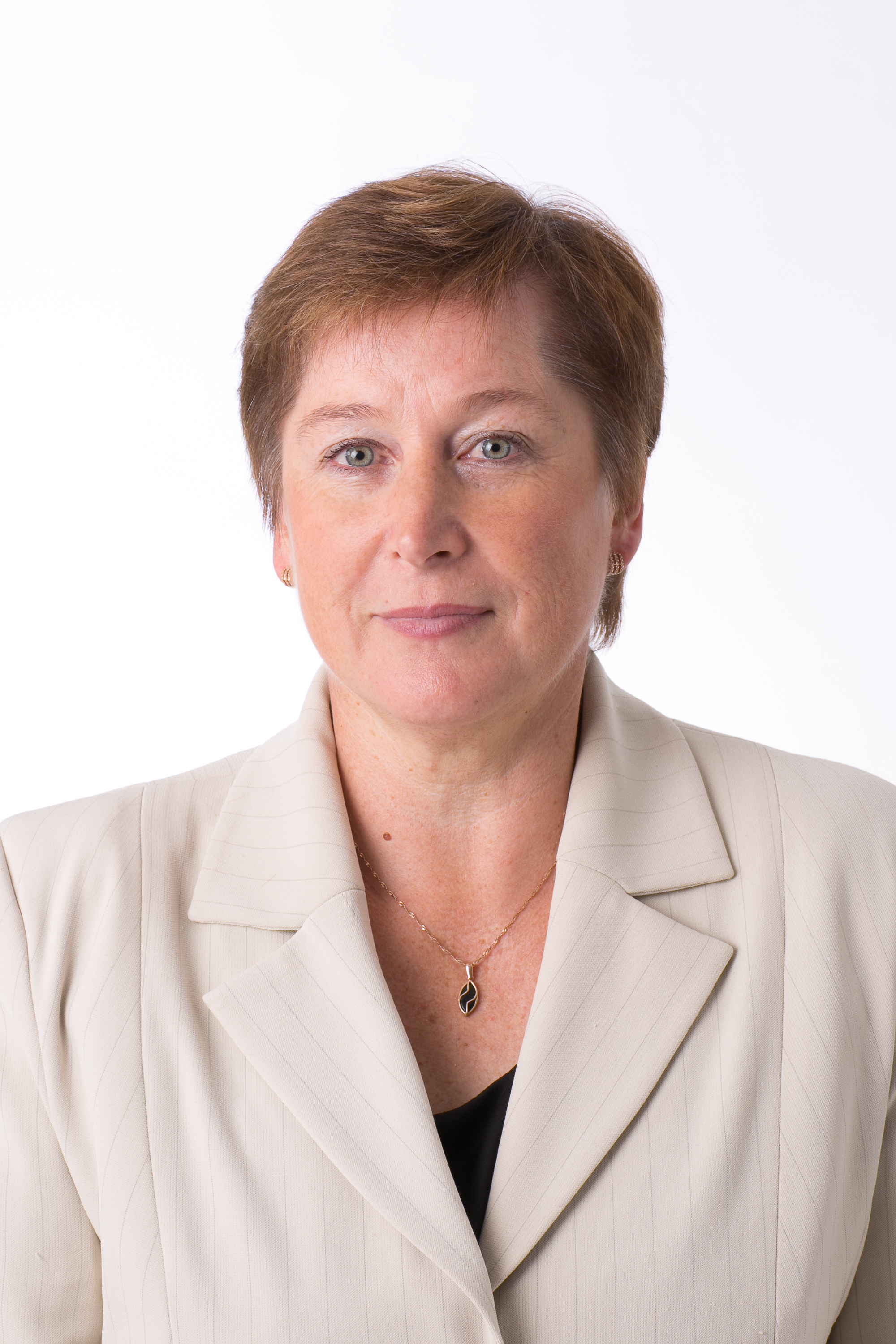 Līvija Plavinska